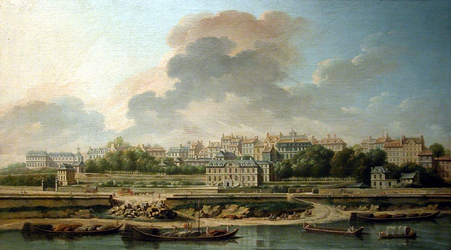 "Quai et village de Passy" (Quai und Dorf Passy), 1757, Paris, Musée Carnavalet